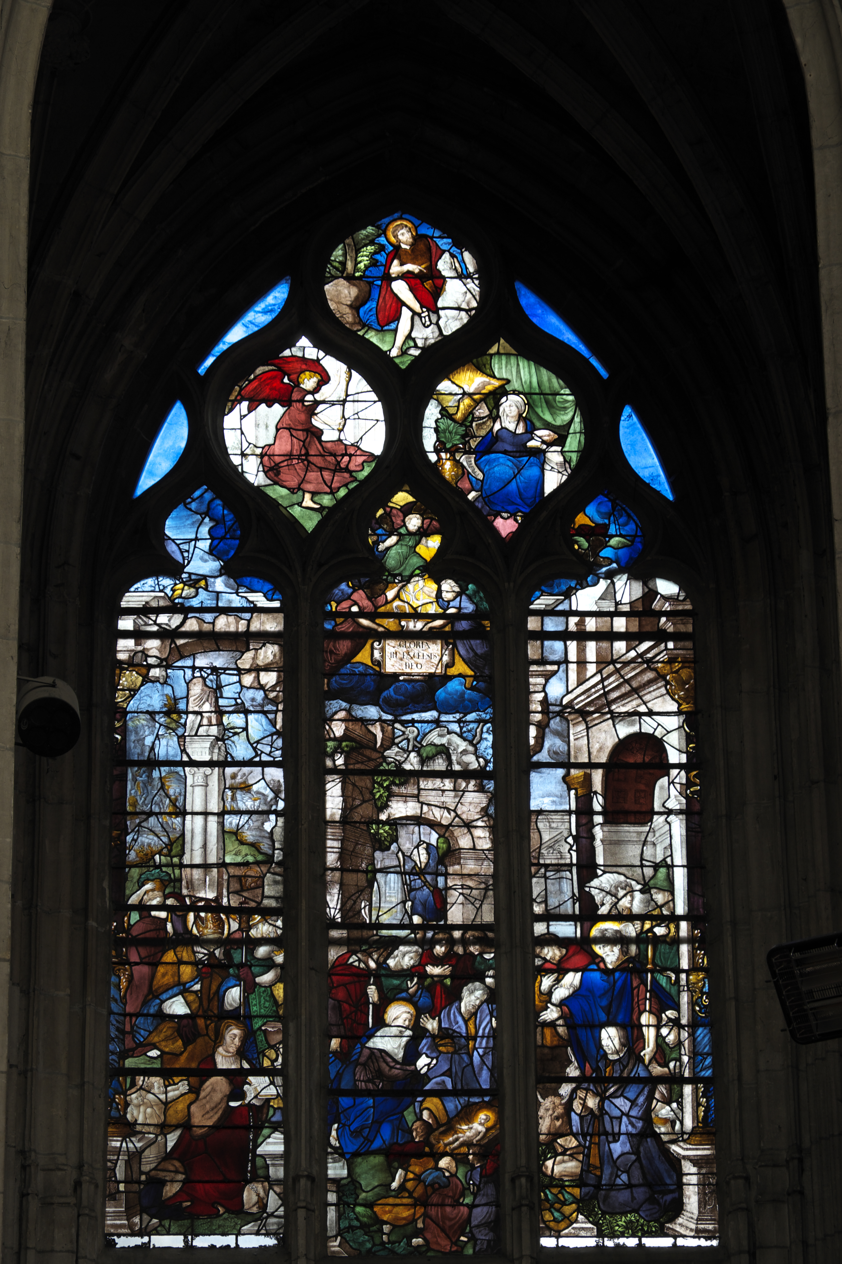 Katholische Kirche Sainte-Foy in Conches-en-Ouche im Département Eure (Haute-Normandie/Frankreich), Bleiglasfenster aus der 1. Hälfte des 16. Jahrhunderts; Darstellung: Geburt Jesu (Mitte)